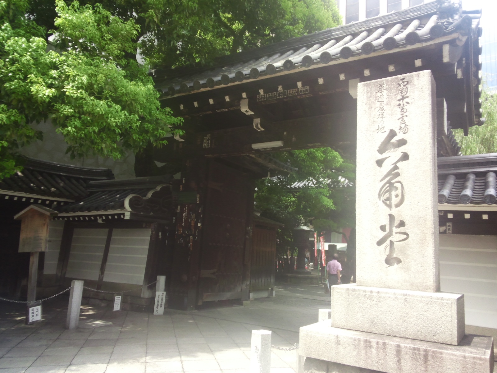 頂法寺 六角堂 - 入口